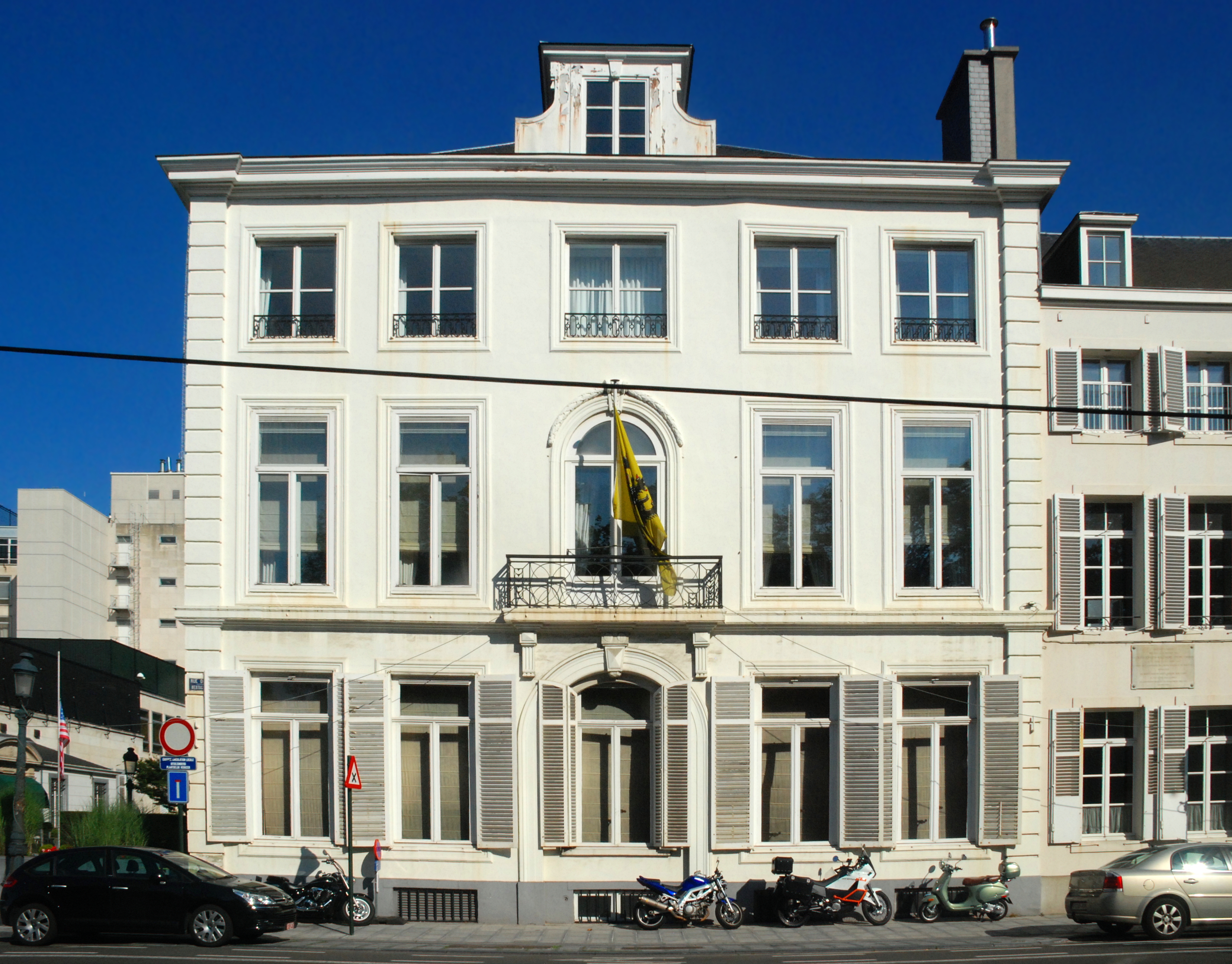 Belgique - Bruxelles - Hôtel Empain